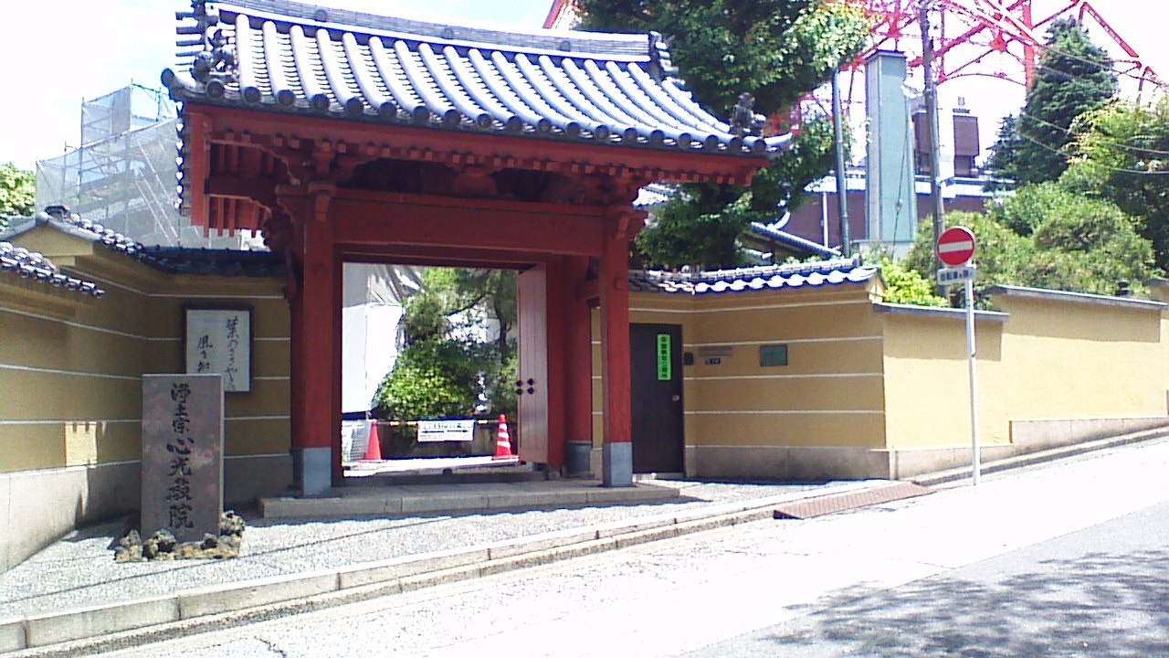 連続文化財毀損事件の被害をうけた東京・港区の心光院の表門（登録有形文化財）、既に汚れは除去された。背後の東京タワーとのコントラストが面白い。